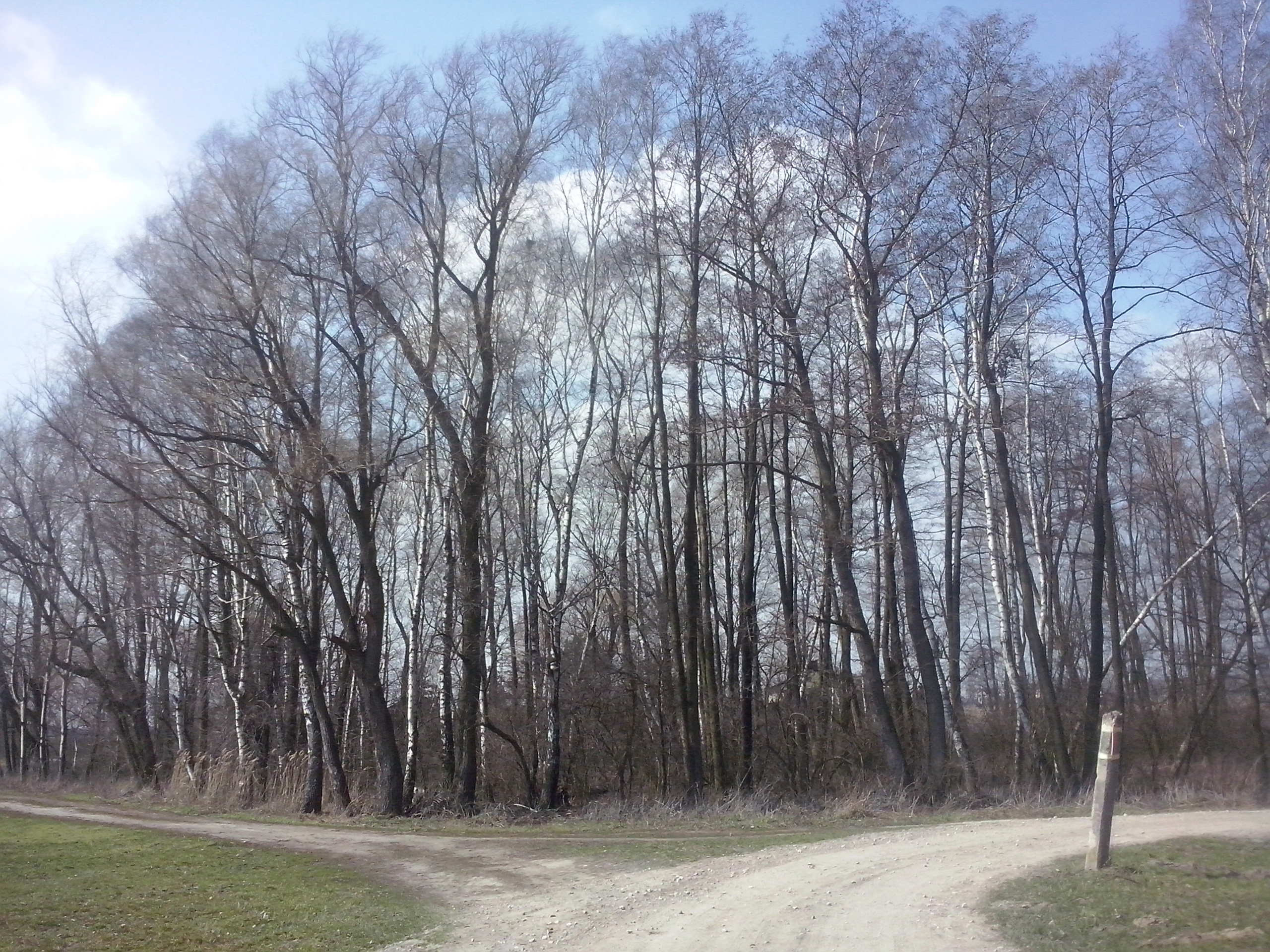 Las w Starej Kłodawie